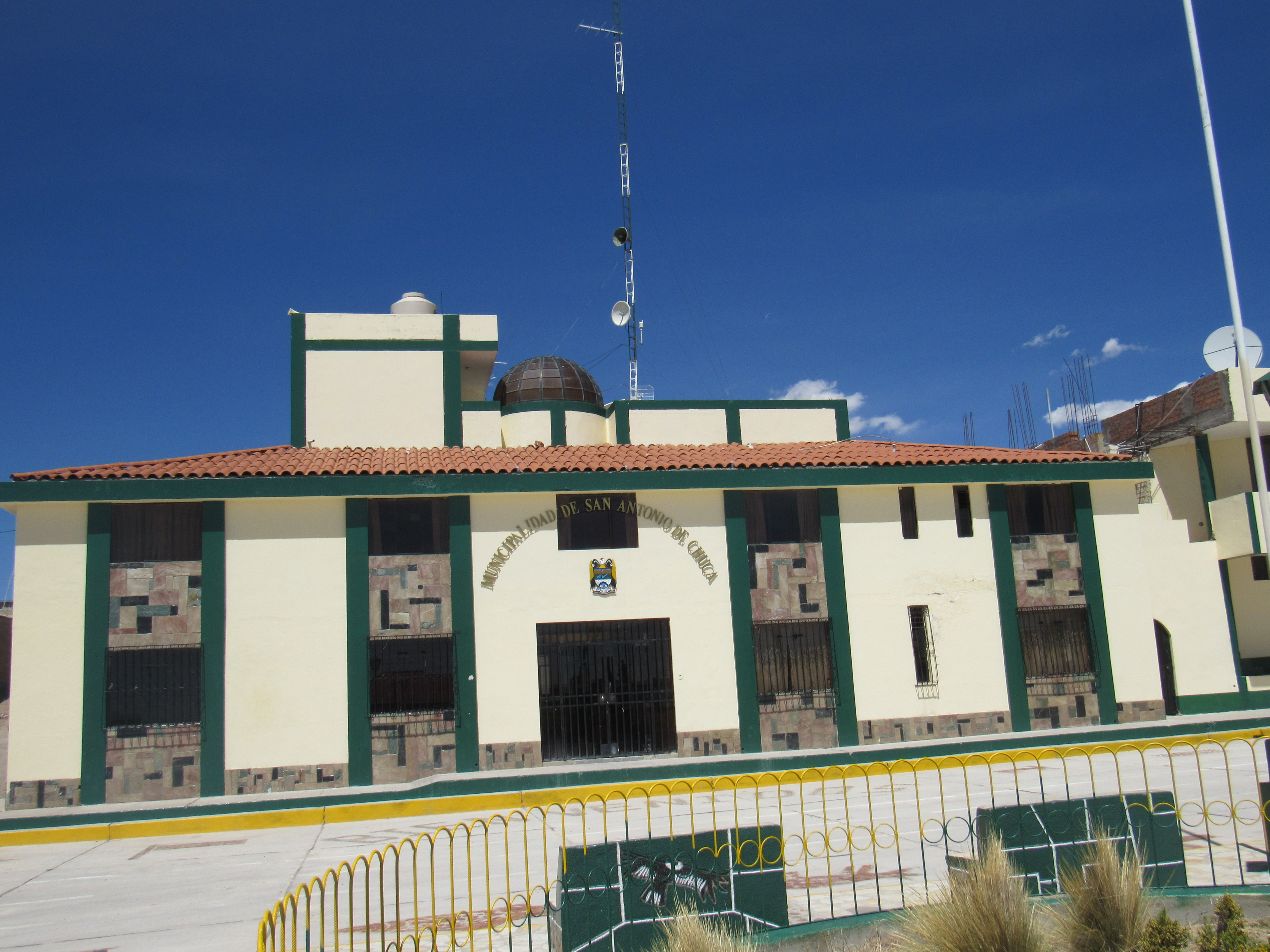 Fachada de la Municipalidad distrital de San Antonio de Chuca (Provincia de Caylloma, Departamento de Arequipa, Perú)